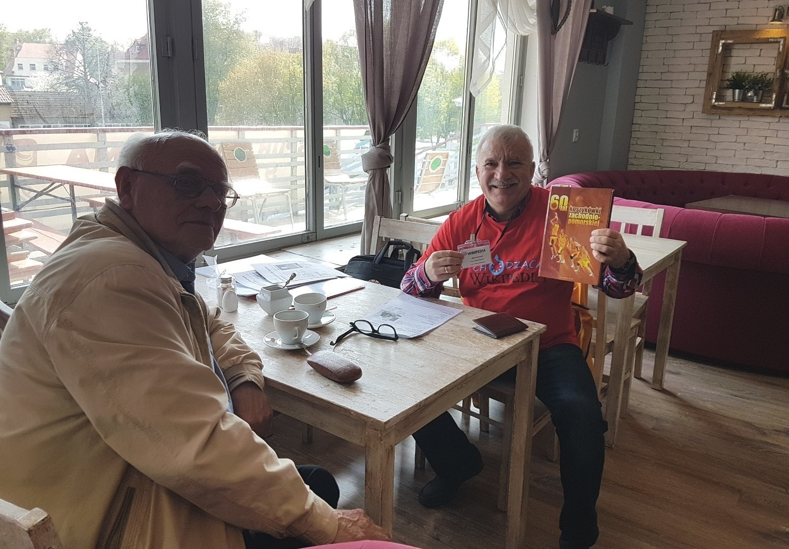 Tadeusz Sikora i red. Wikipedii